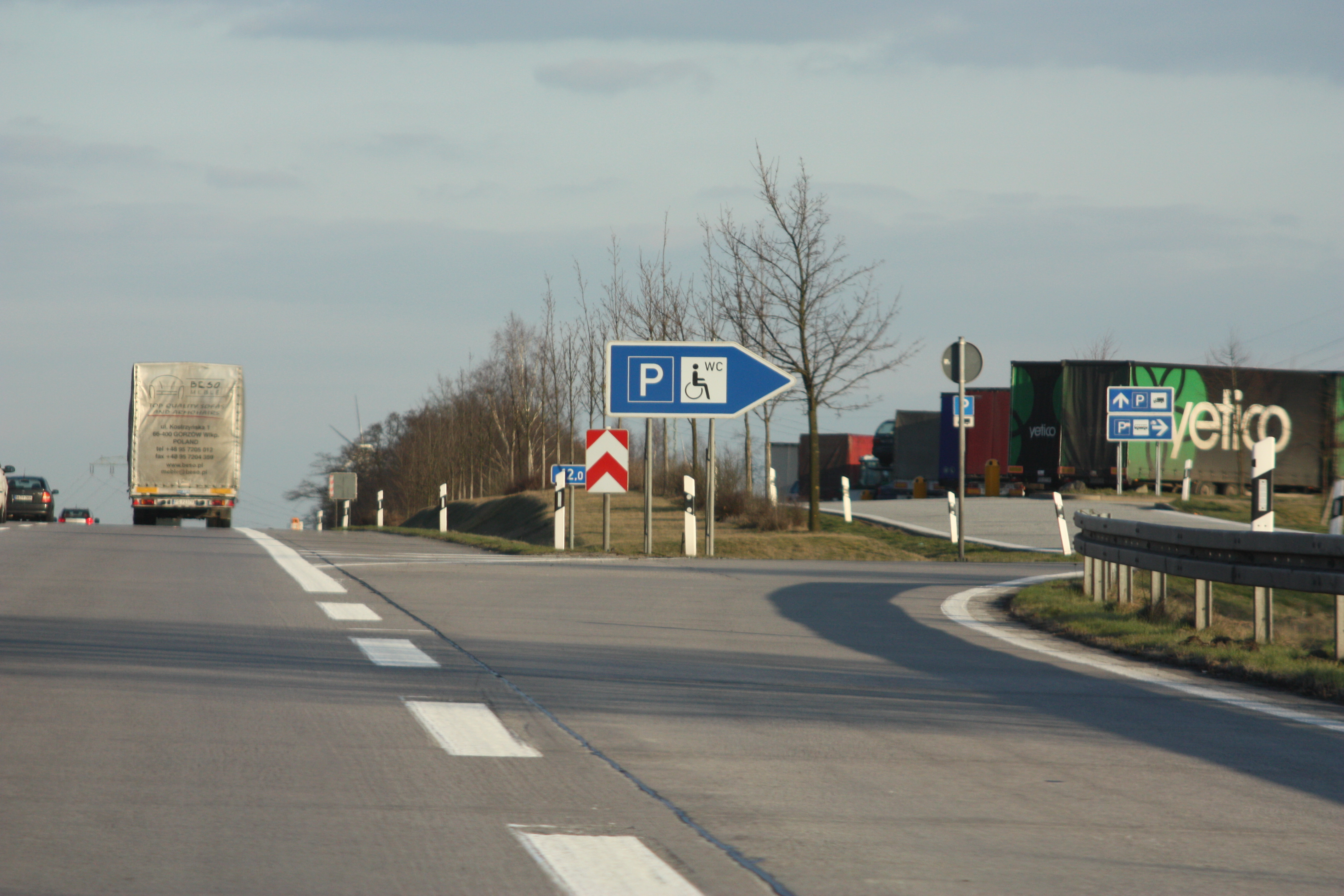 Verkehrszeichen auf der Bundesautobahn